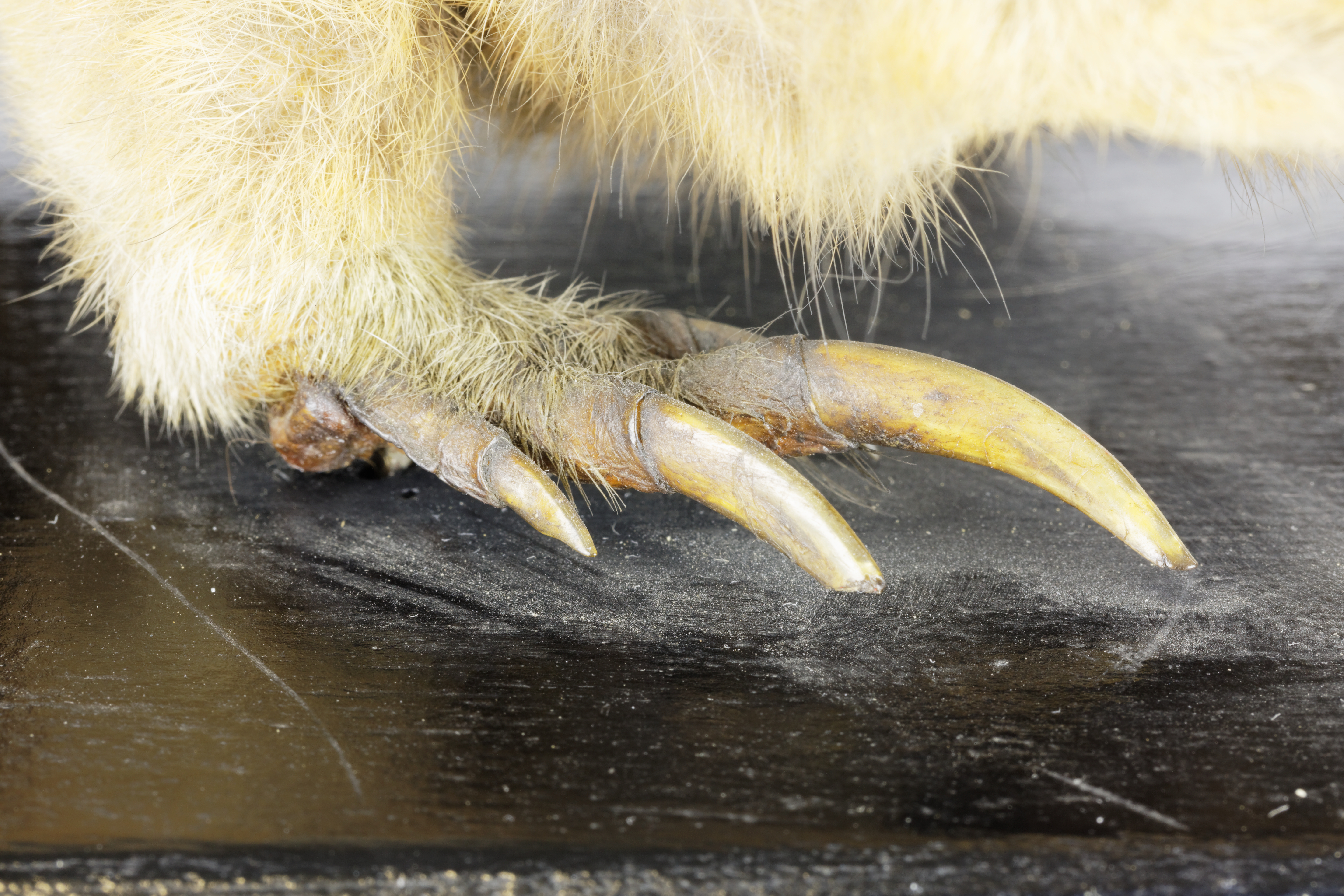 Griffe antérieure droite d'un rat à abajoues Nom vernaculaire Rat à abajoues ou gaufre brun Nom latin Geomys bursarius Nature du spécimen animal à la peau naturalisée Place dans le règne animal Chordé, Mammifère, Rongeur Provenance Collection de Zoologie de l'Université Pierre et Marie Curie (UPMC) à Paris Dimensions du socle (cm) 24,8 (L) x 10,3 (l) x 1,6 (h) (bois) Longueur approximative du spécimen (cm) 25 (sans la queue) (donnée non biométrique). Hauteur total du spécimen (cm) 8.8 (donnée non biométrique)